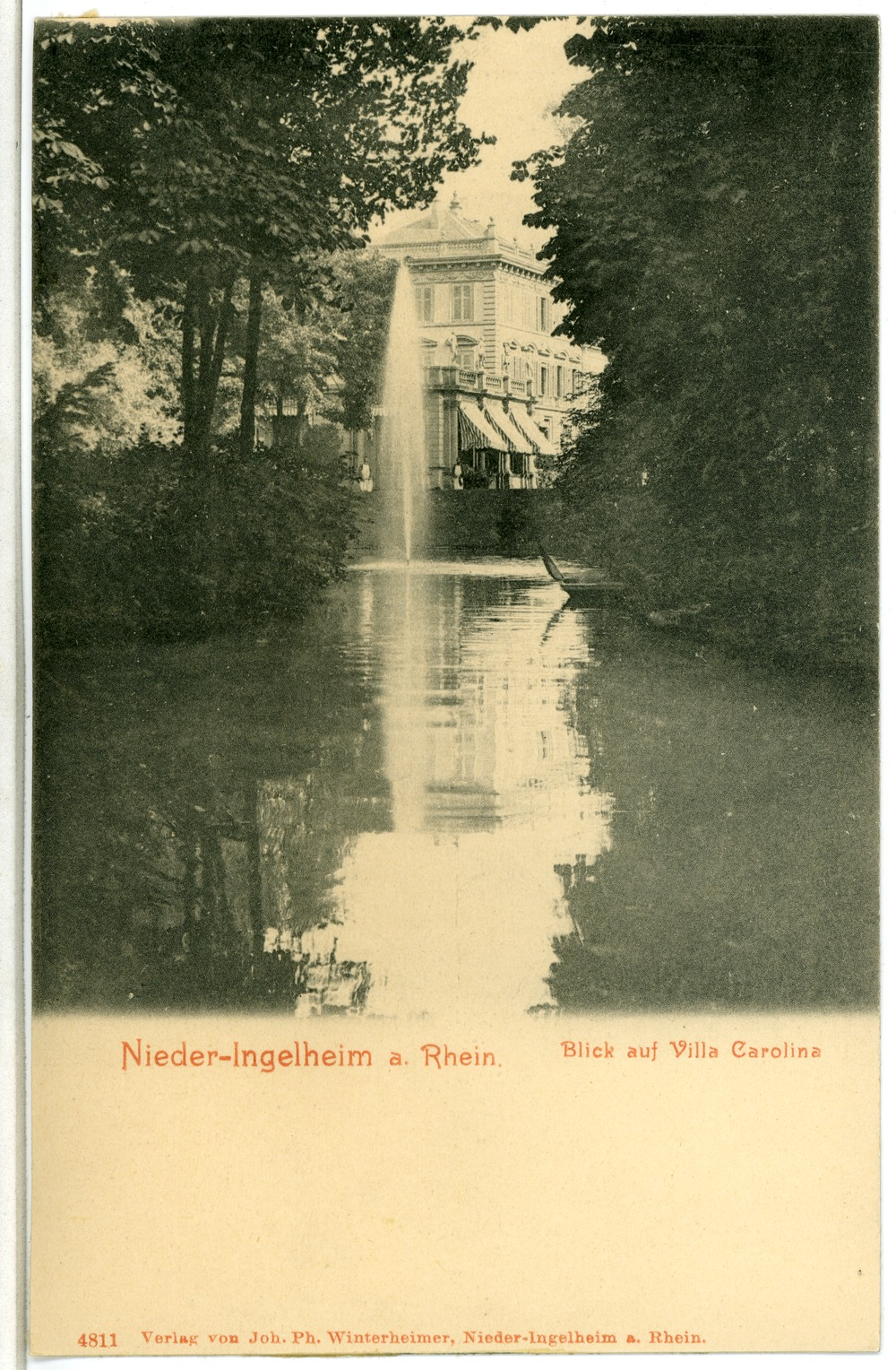 Nieder Ingelheim; Villa Carolina. Caroline von Bernus, Tochter des Frankfurter Senators Freiherr Franz von Bernus, heiratete am 10. Oktober 1859 den Juristen Dr. Wilhelm von Erlanger. Das Wohnhaus wurde 1938 abgerissen, der dazugehörige Park vergrößert und verschönert. This postcard is from publisher Brück & Sohn in Meißen ( postcard has a unique number 04811 and is available in a higher resolution at the publisher. This images was uploaded in a cooperation project between Wikipedians and the publisher.